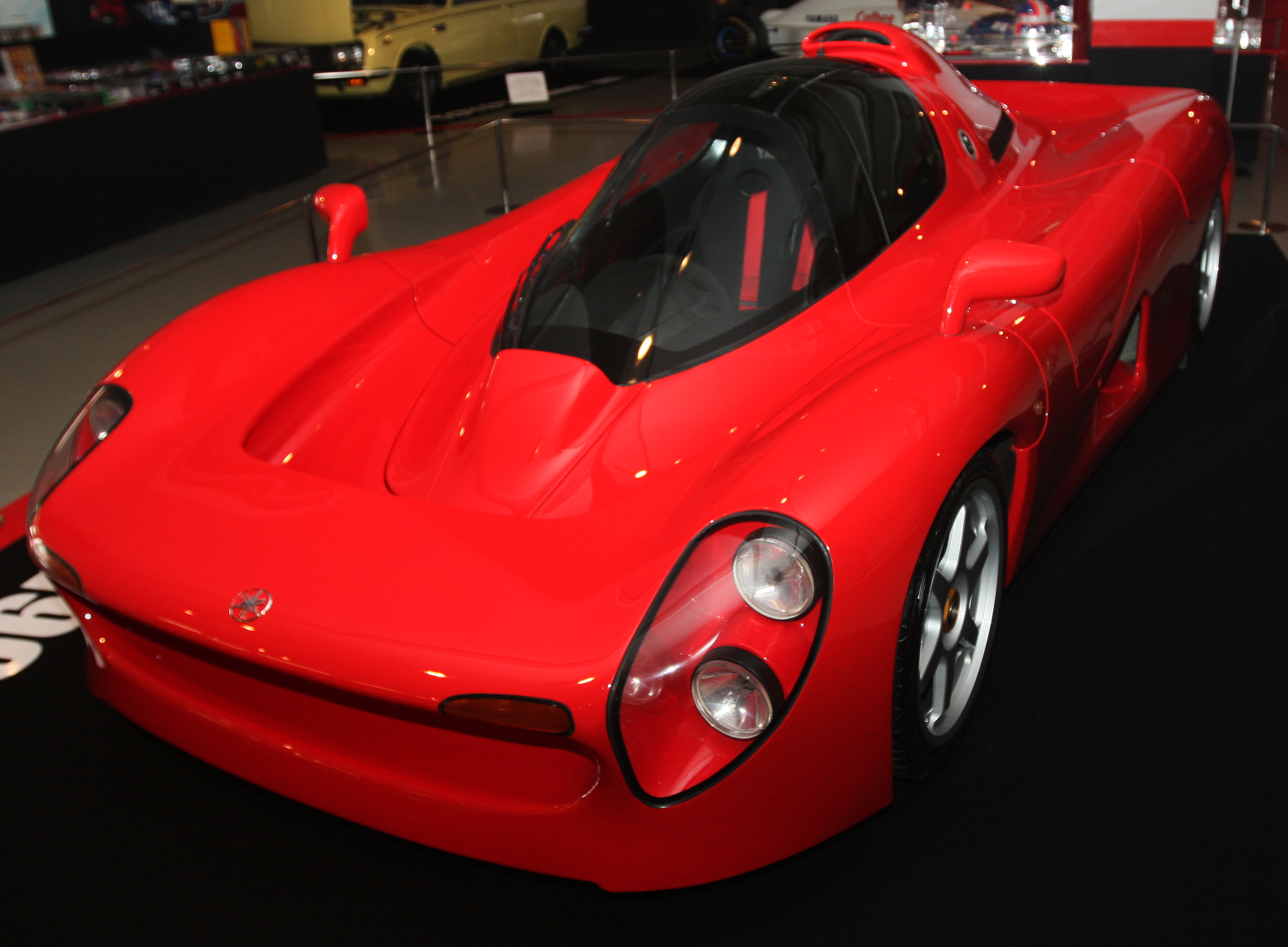 Yamaha OX99-11